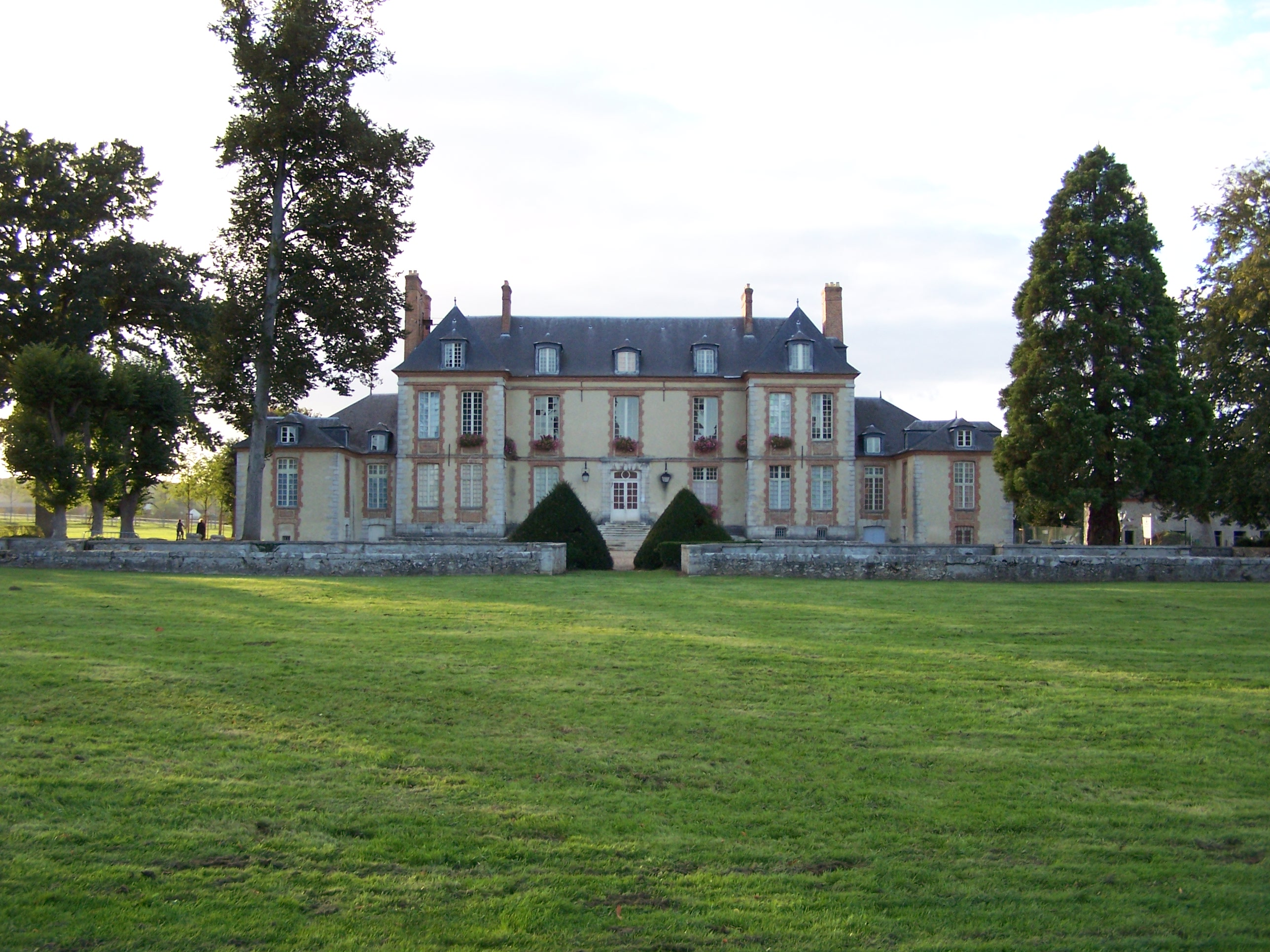 Château de Plaisir (Yvelines, France), façade est